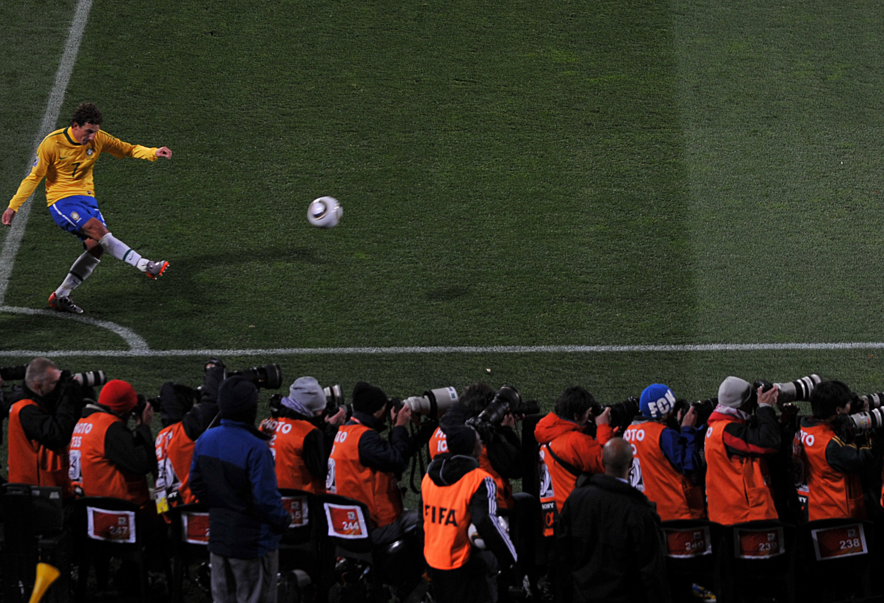 Seleção brasileira estreia na Copa do Mundo de 2010 contra a Coreia do Norte.